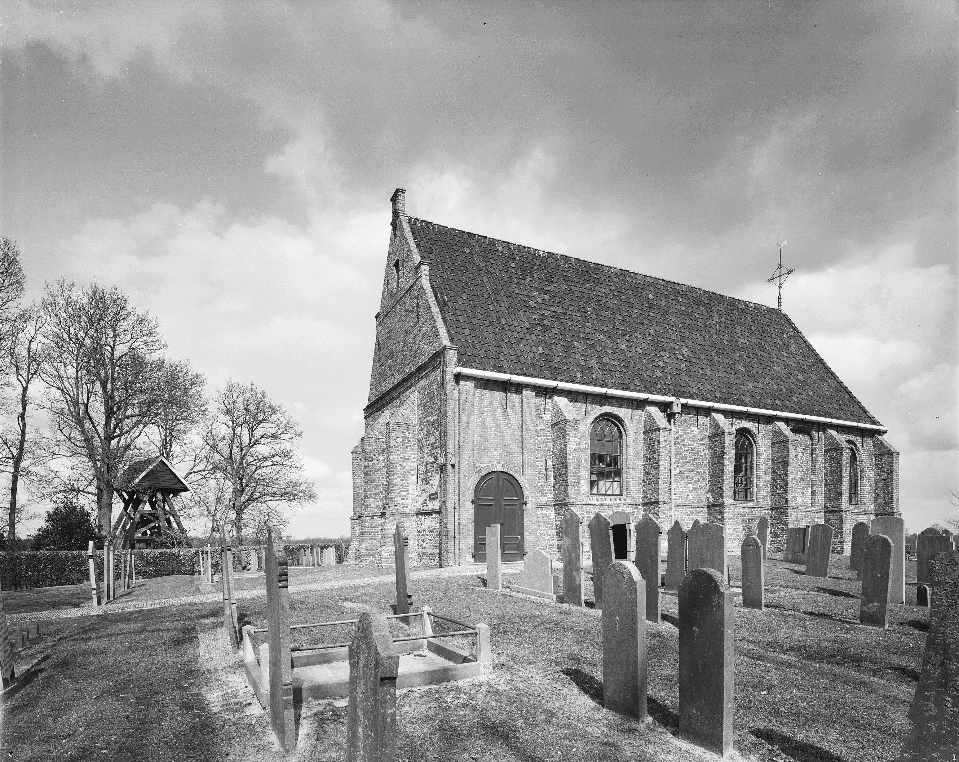 Ned.Herv.Kerk: zuidgevel